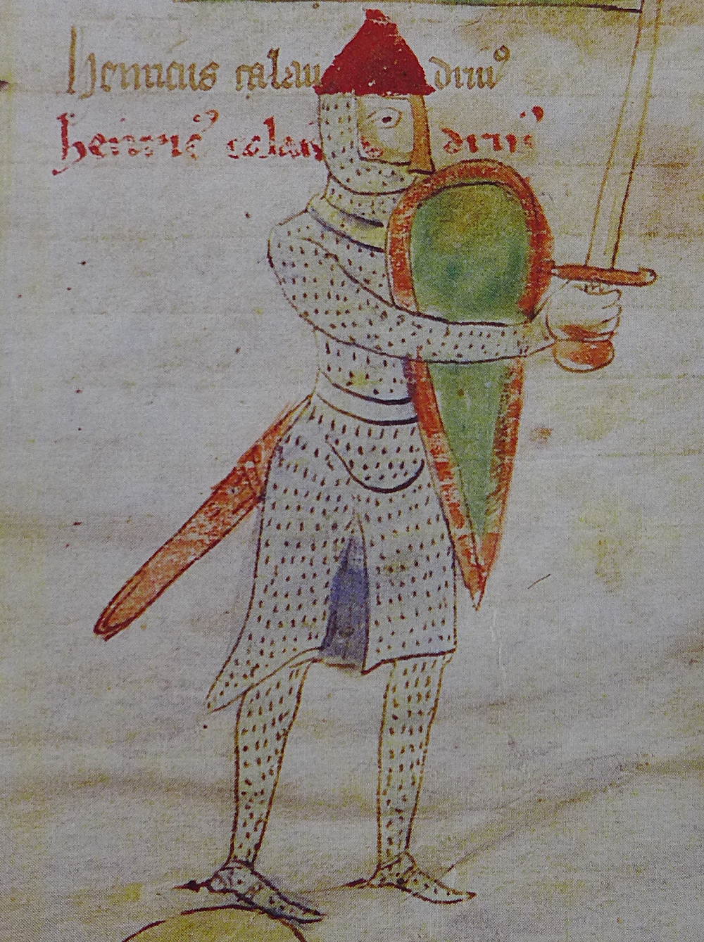 Jindřich z Kalden